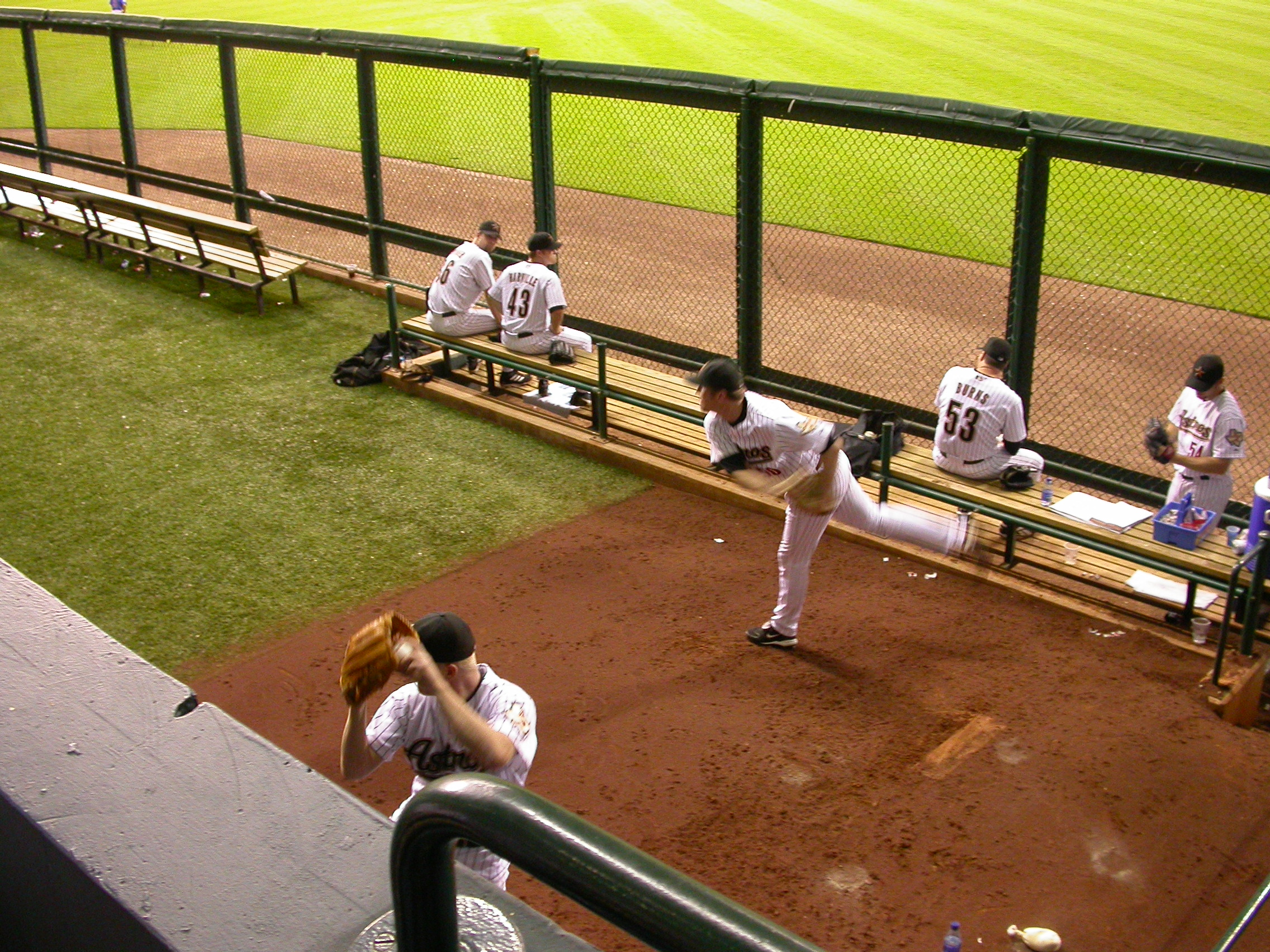 Autore: D.L. Descrizione: Lanciatori degli Houston Astros si riscaldano nel bullpen Origine: Flickr URL